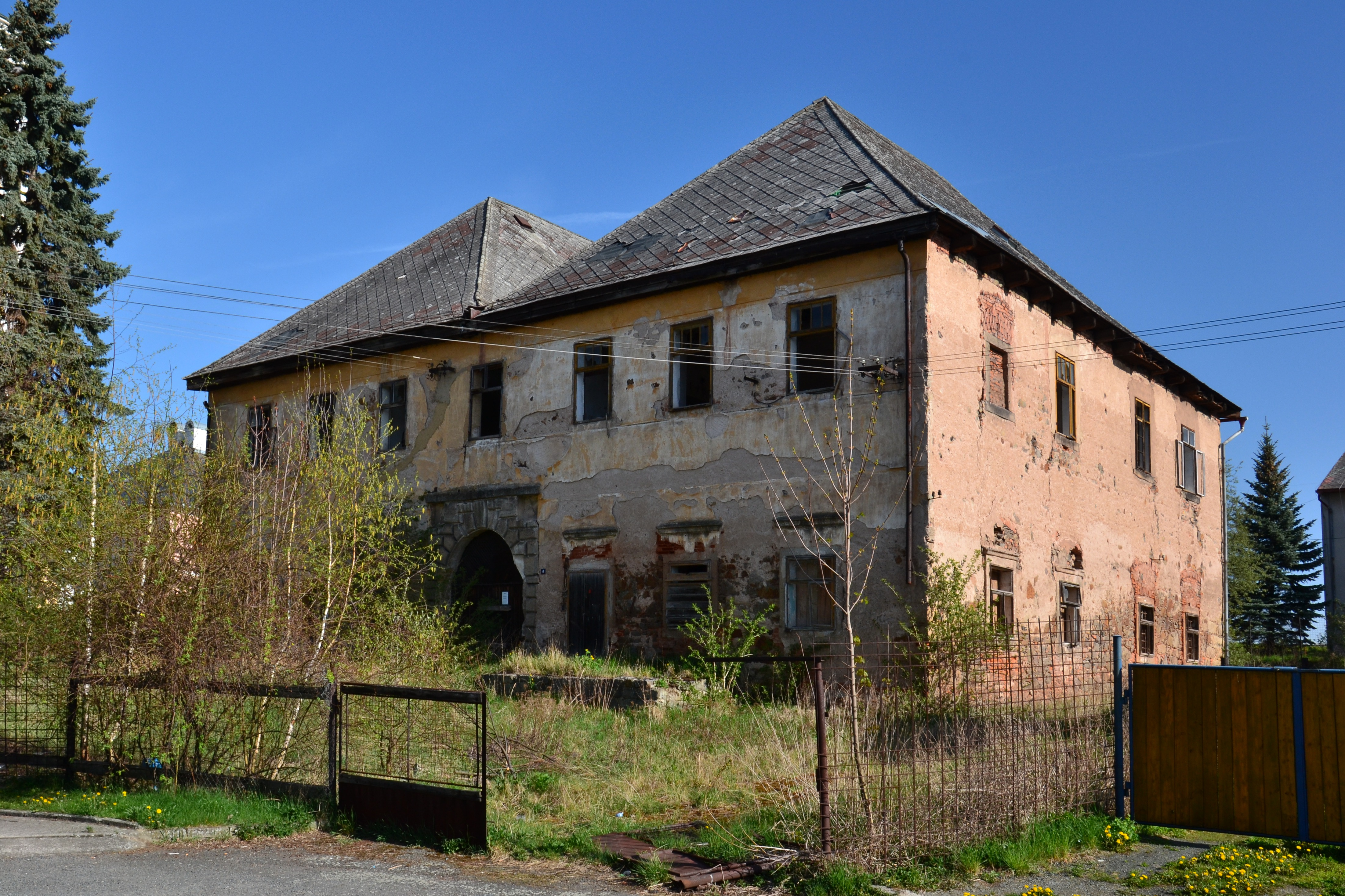 Zámek Žihle, Žihle 48, Žihle.